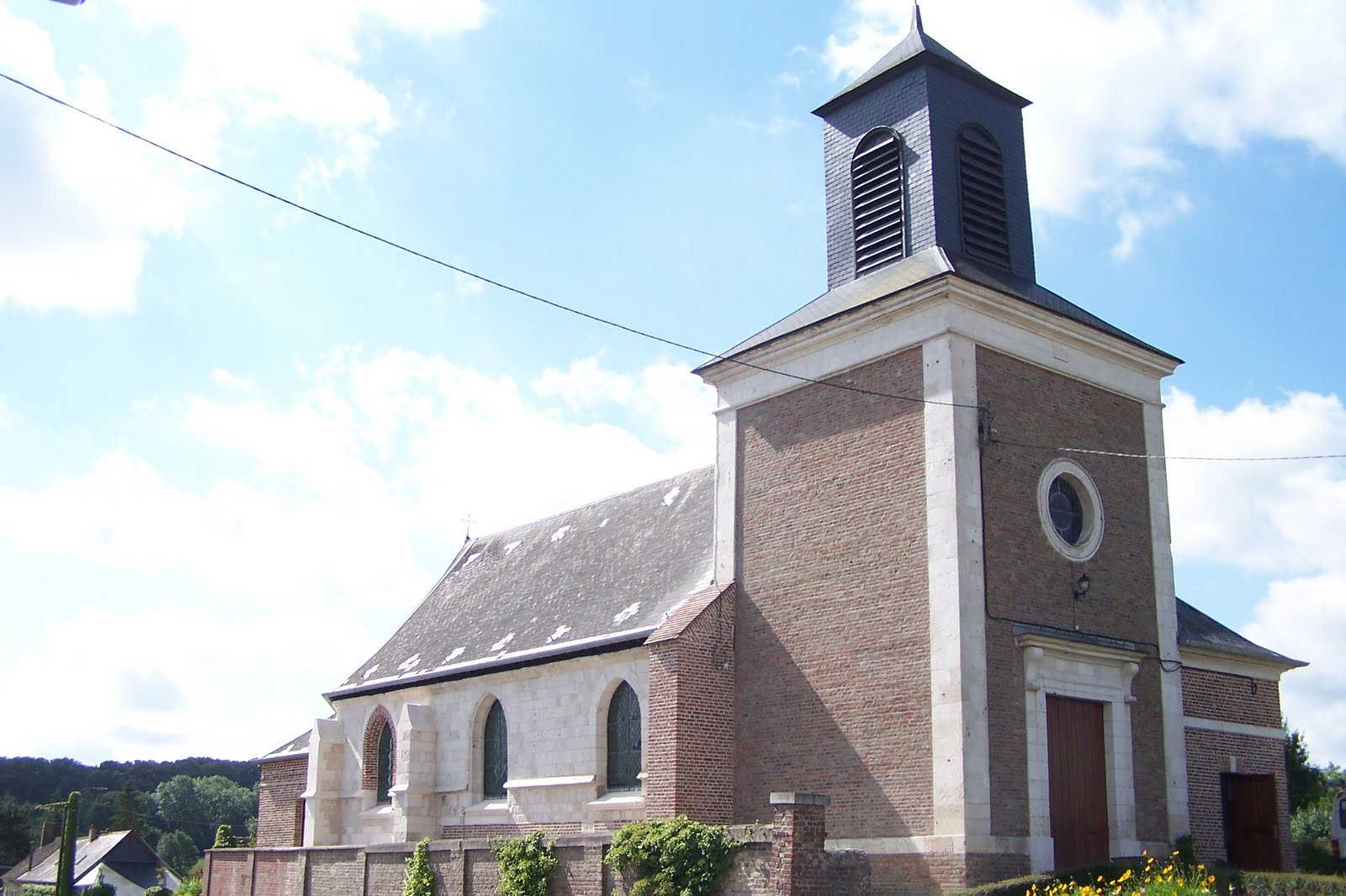 église vue de la route départementale